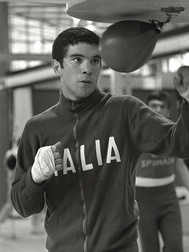 Giorgio Bambini, 1968 Olympics